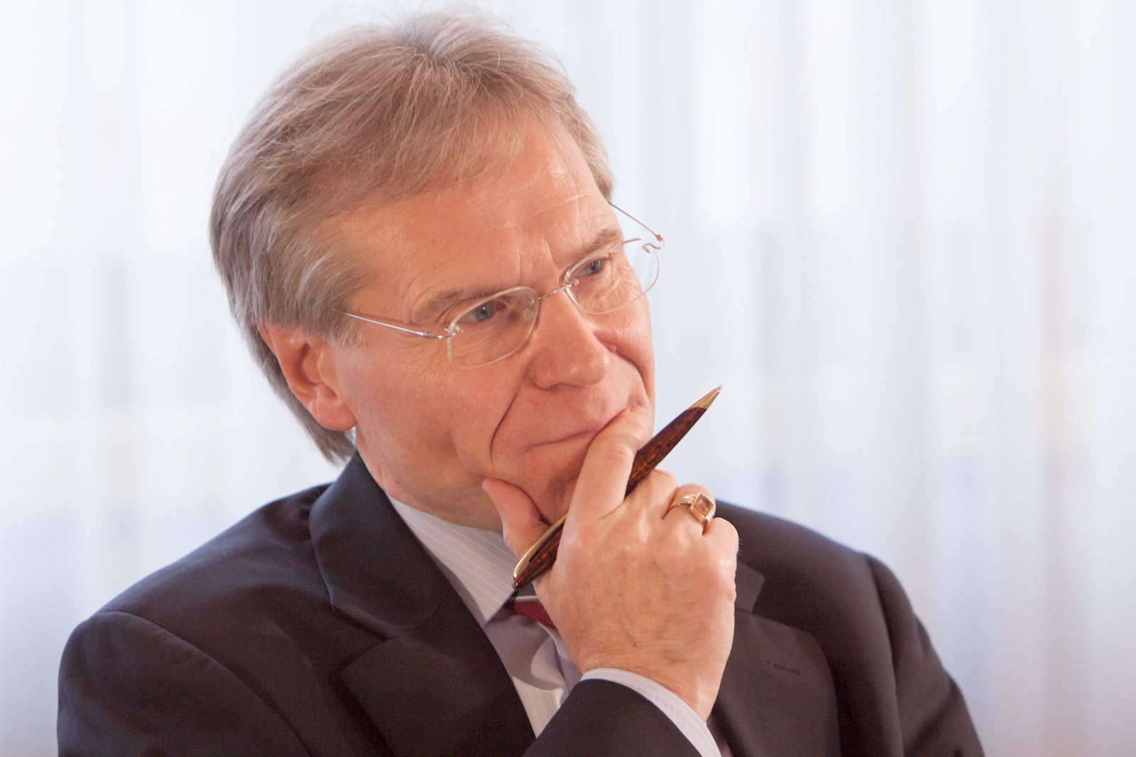 Prof. Dr. Hanns Jürgen Küsters, Hauptabteilungsleiter WD-ACDP